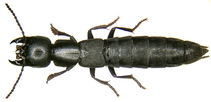 Familie: Staphylinidae Grösse: 12-20 mm Verbreitung: Europa Fundort: Germania, Bayern, Oberfranken, Weismain leg.det. U.Schmidt, 1983 Foto: U.Schmidt, 2005